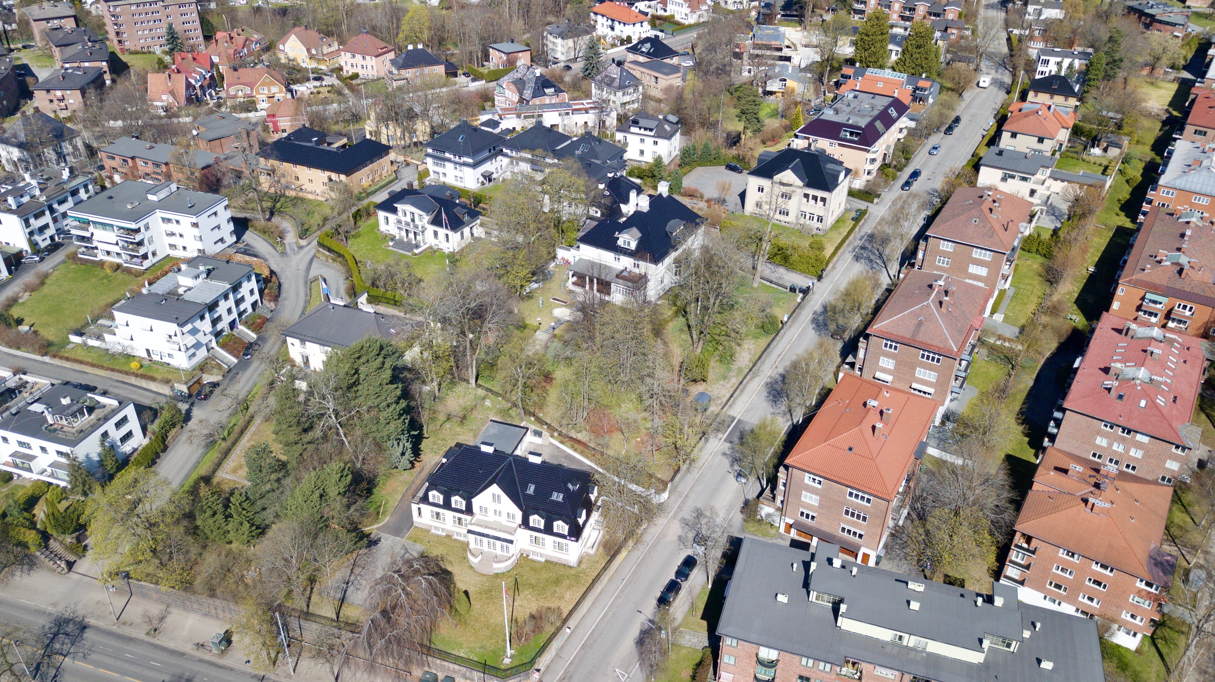 Kristinelundveien i Oslo.